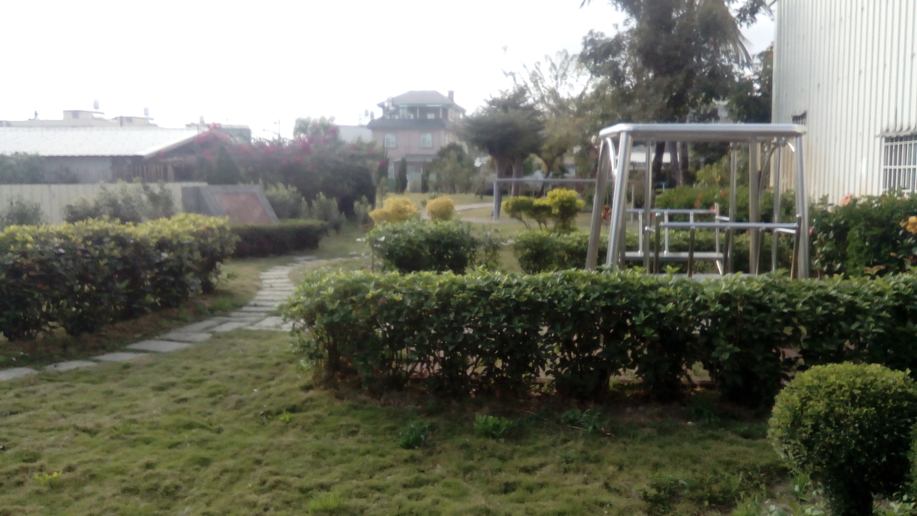 同上，2009年88水災(莫拉克颱風)時 因高屏溪堤防潰堤而重創該村 災後重生的村民 彼此間達成共識 運用大水過後所留下的素材(如漂流木) 將之改建成公園 供後世記取教訓